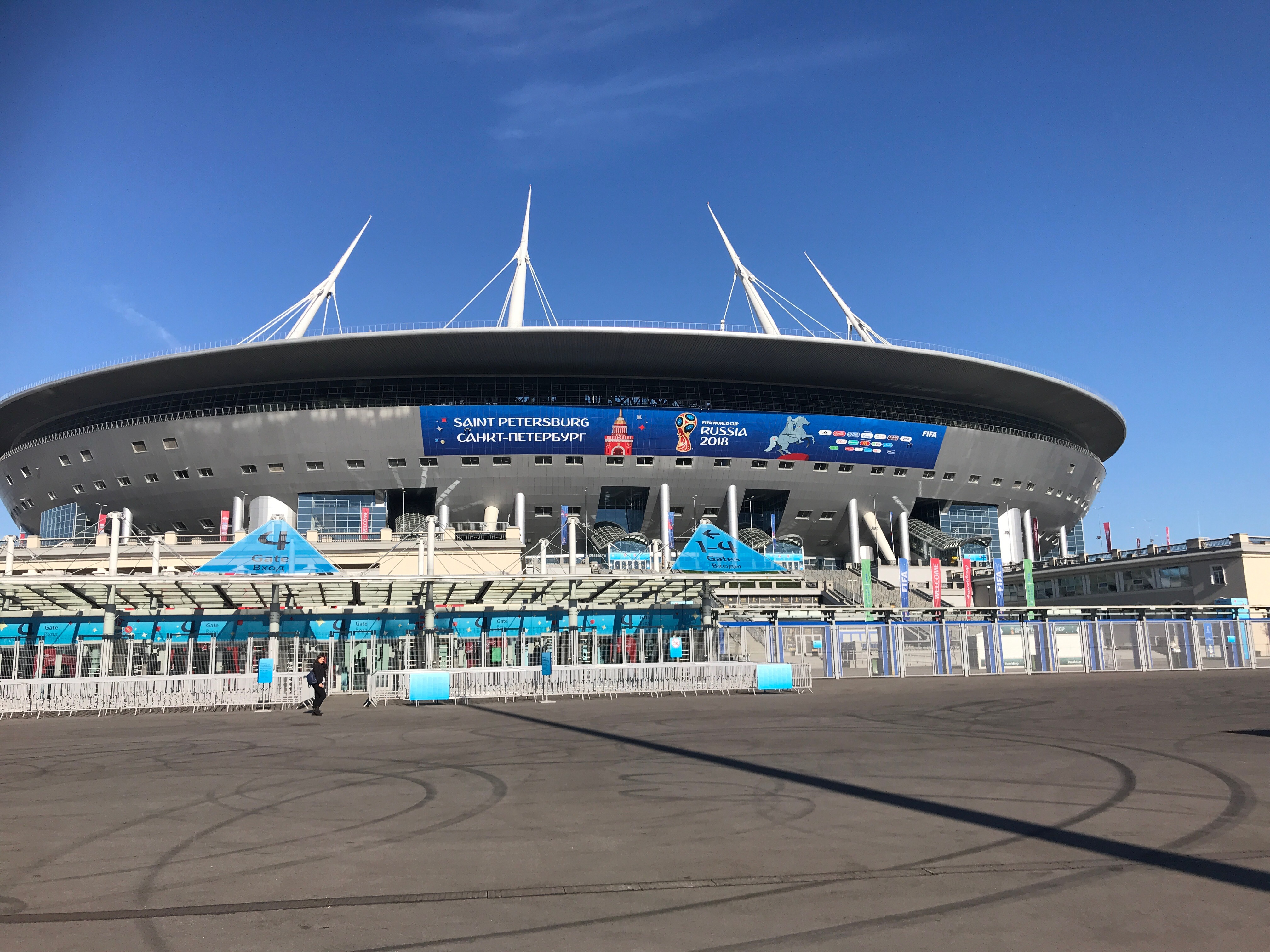 Арена Санкт-Петербург